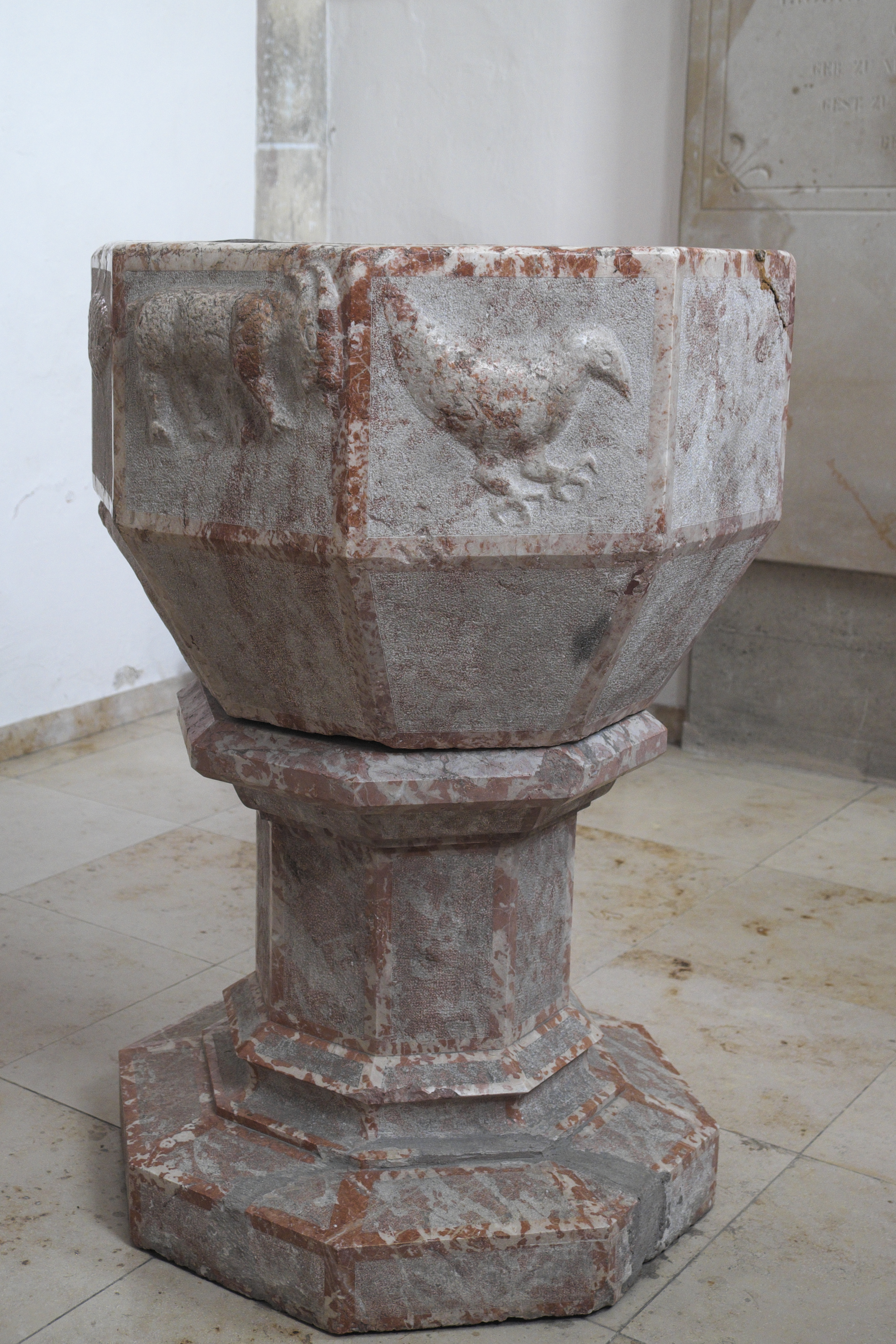 Katholische Pfarrkirche St. Benedikt in Altmünster im Bundesland Oberösterreich (Österreich), romanisches Taufbecken